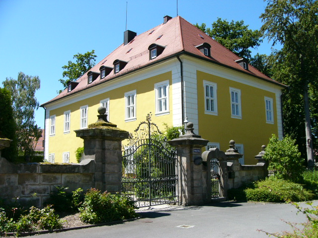 Schloss Birken im gleichnamigen Ortsteil Bayreuths